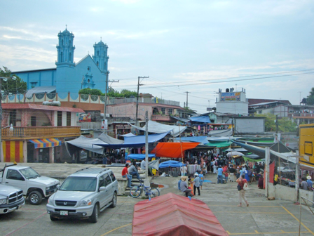 Centro de la población de Jalapa de diaz